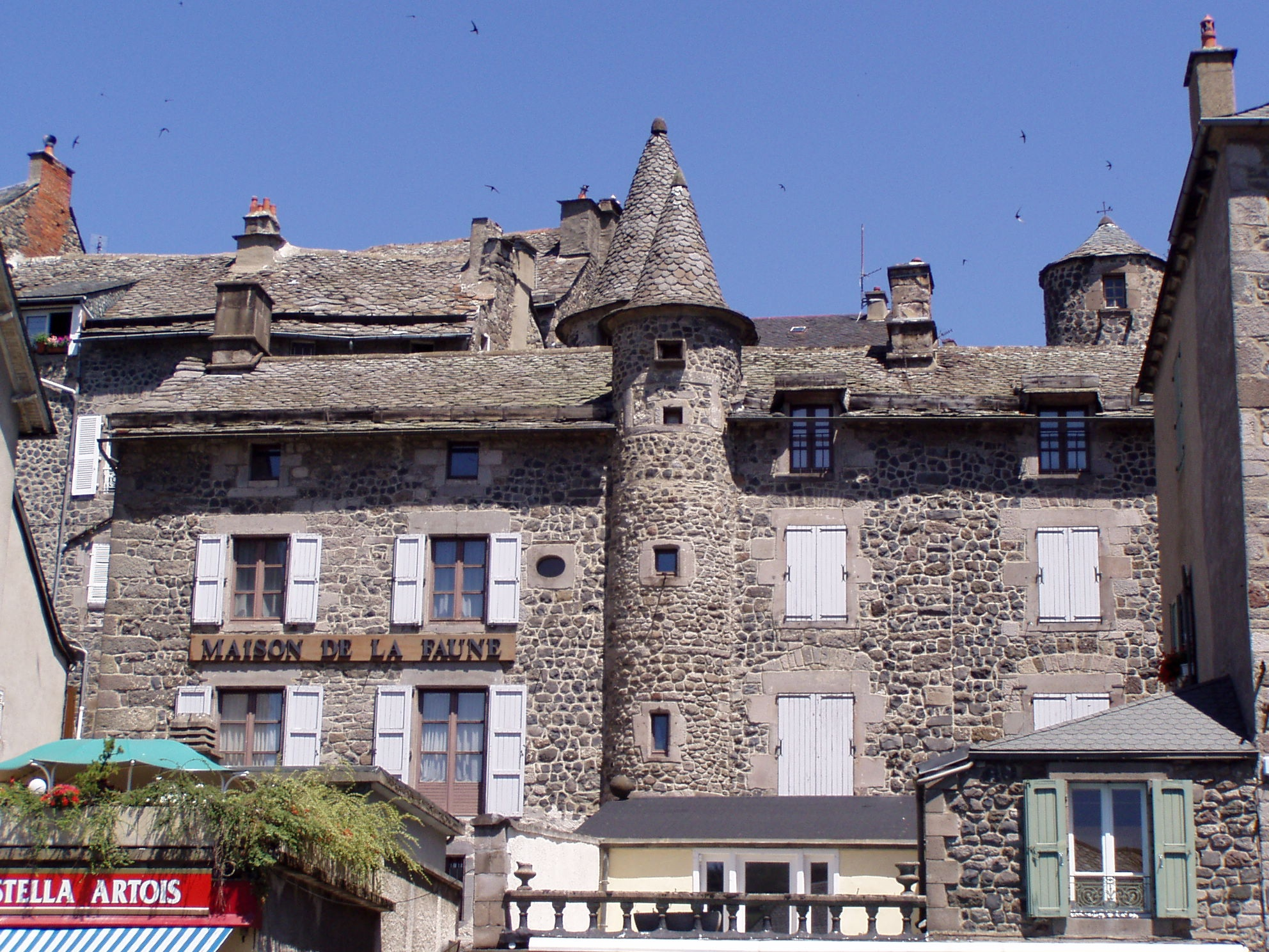 Maison de la Faune à Murat (cantal)